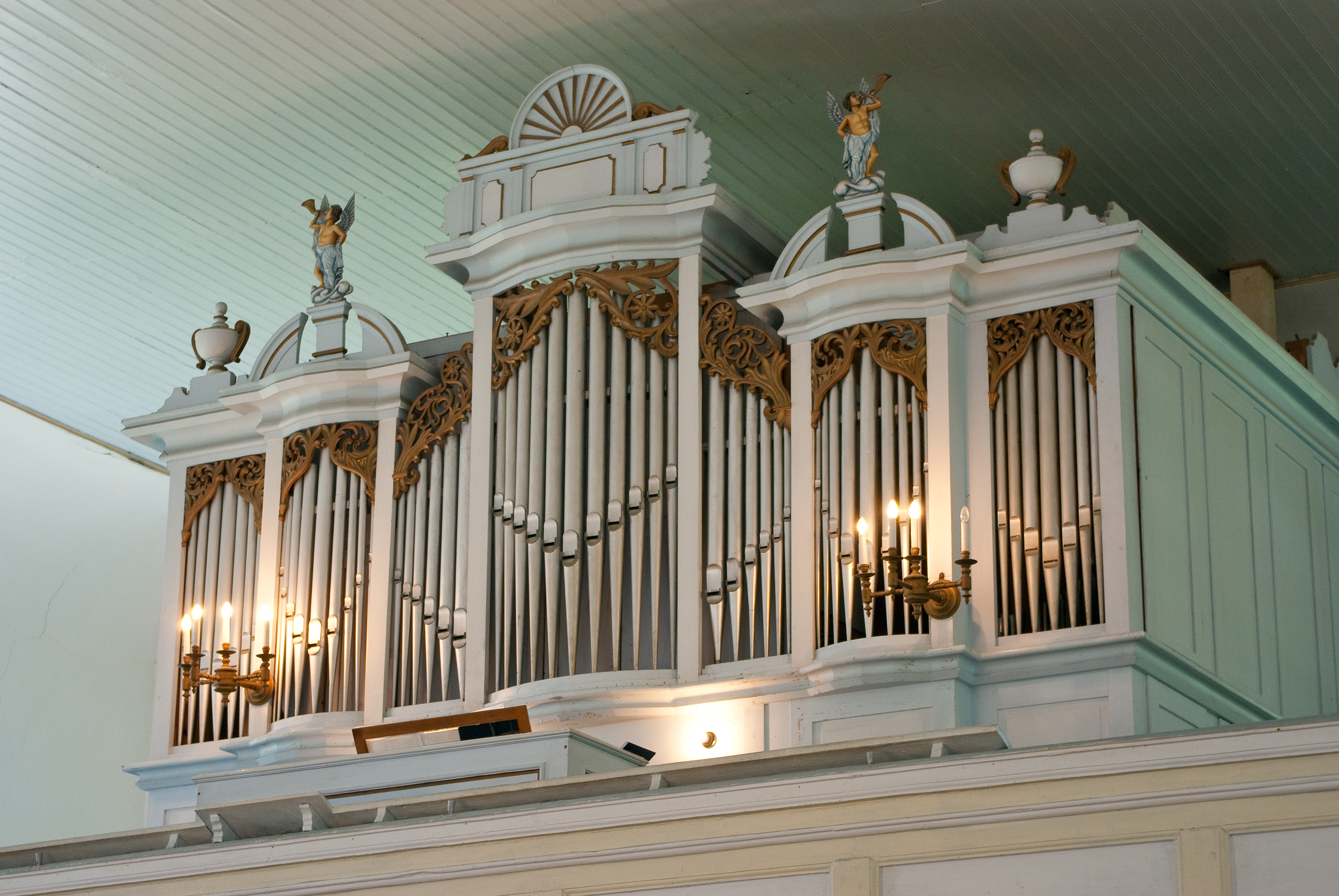 Kriisade orel Rõuge Maarja kirikus